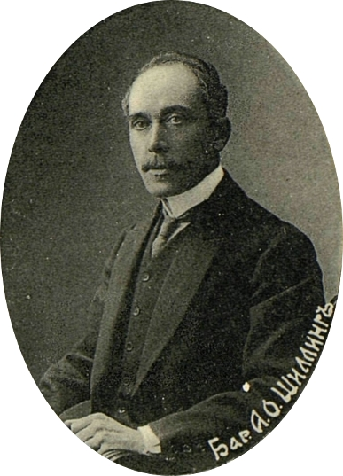 барон Альфред Оттонович Шиллинг, член III Государственной думы от Эстляндской губернии, член Государственного Совета по выборам.